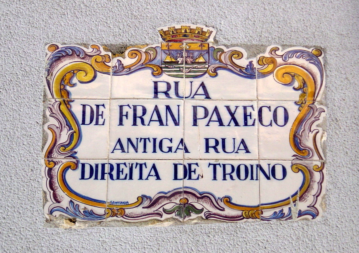 Placa identificadora da Rua Fran Paxeco em Setúbal